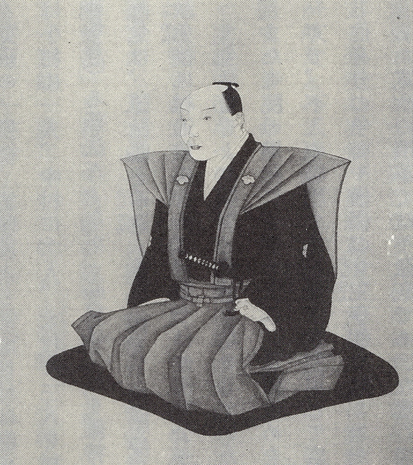 藤堂高兌の肖像。